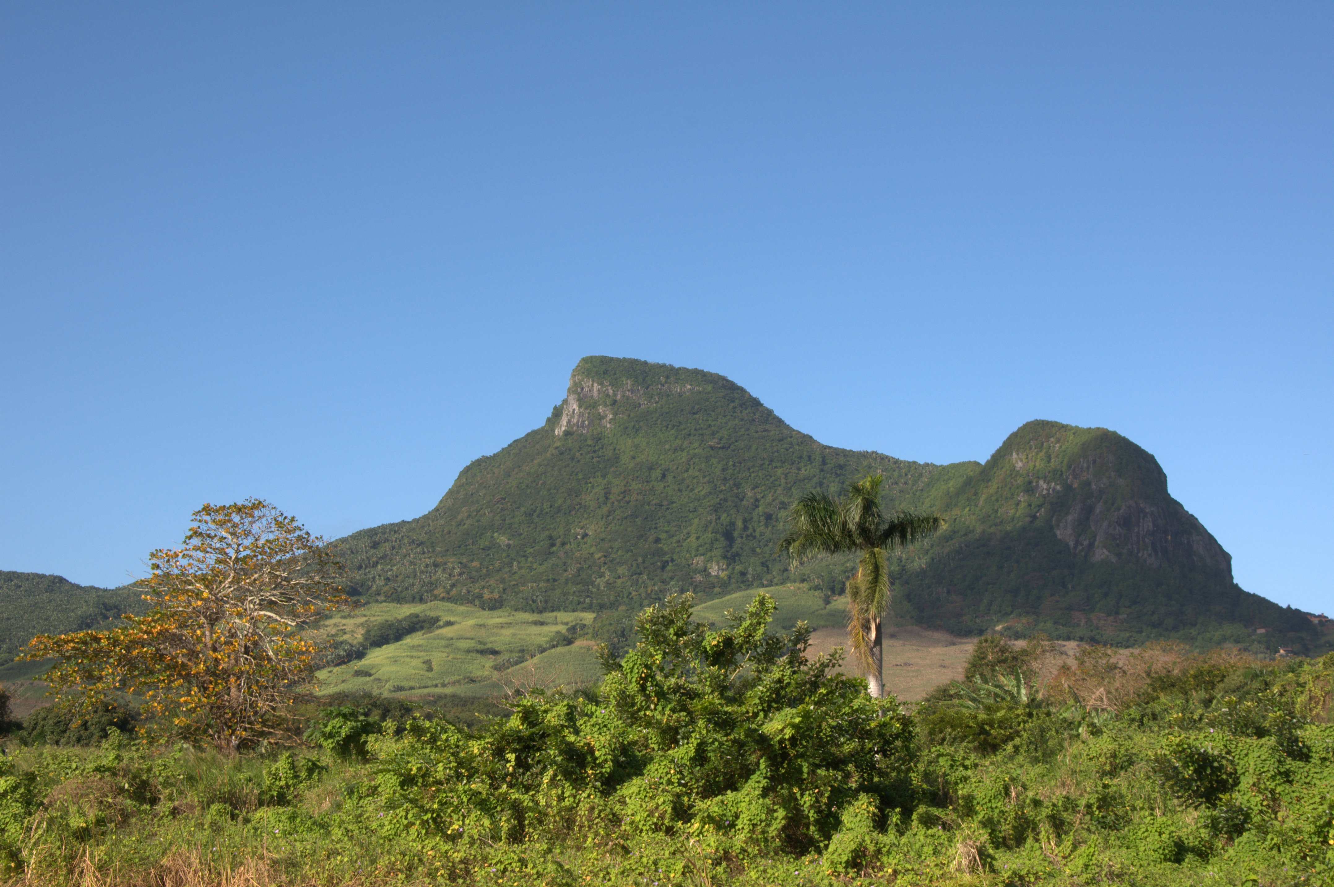 Mauritius, Grand Port, Domaine du Chasseur Reserve